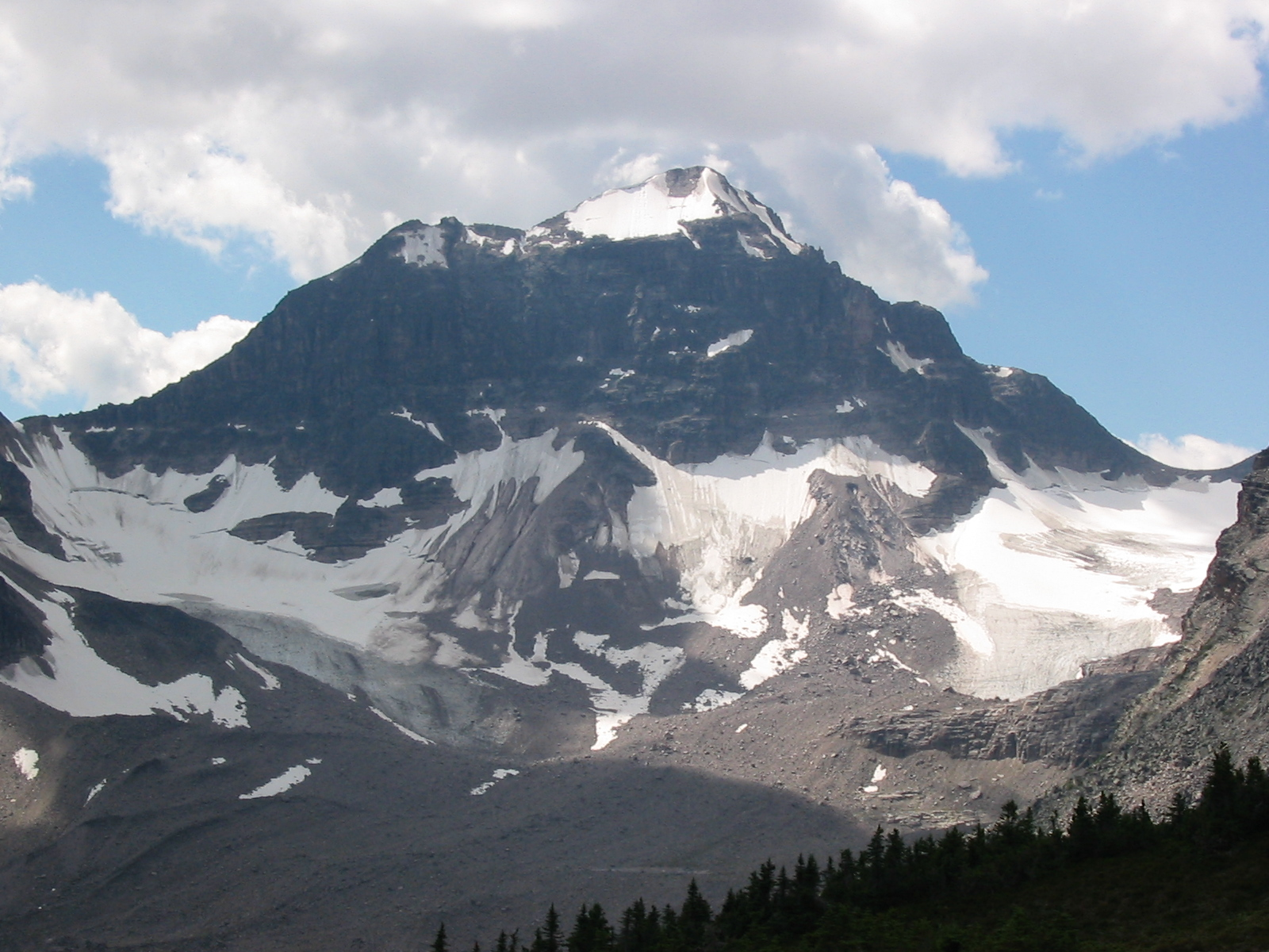 Fryatt Valley